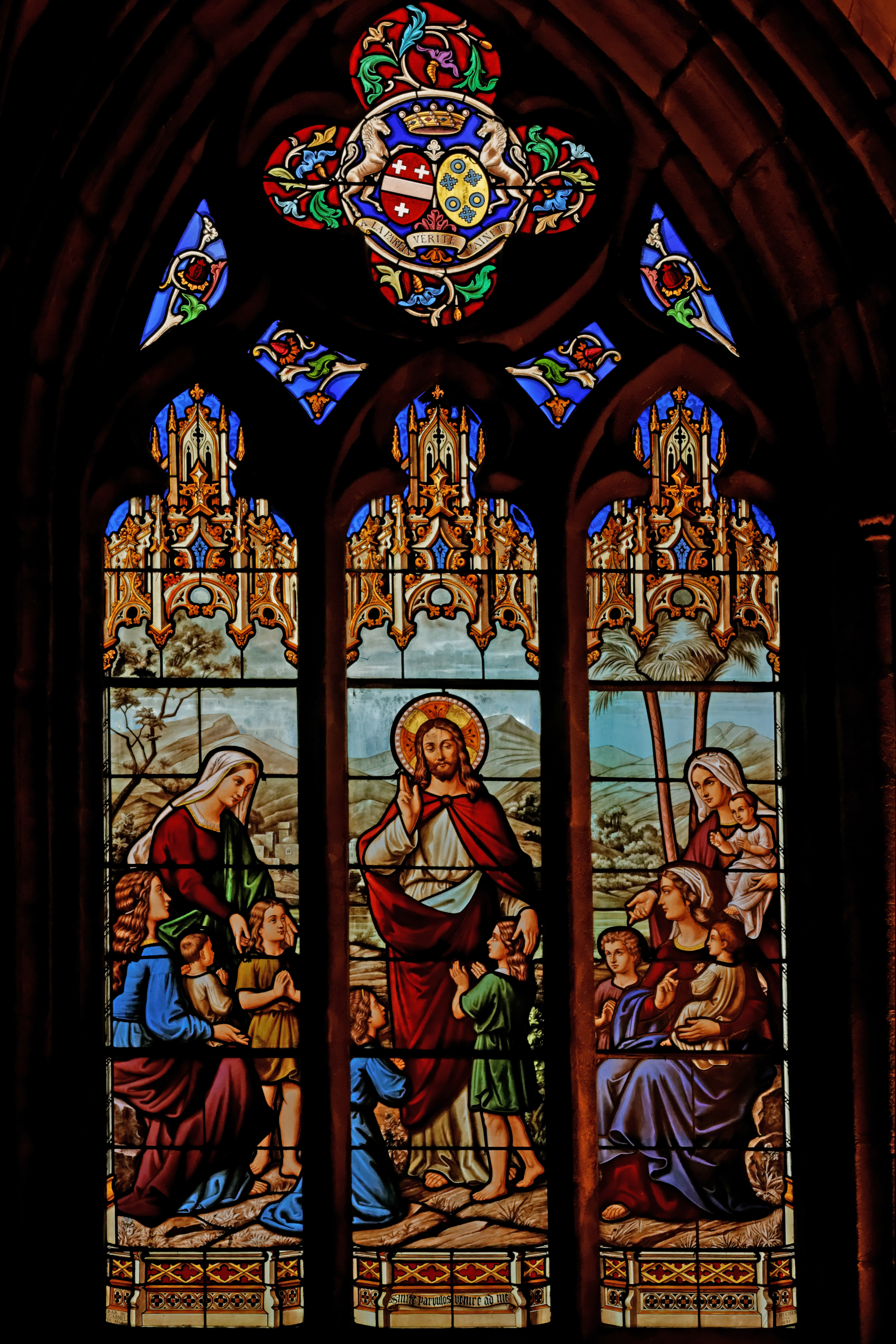 Vitrail de F. Hucher successeur (Fabrique du Carmel du Mans), daté de 1891 et représentant une scène évangélique illustrant la parole de Jésus "Laissez venir à moi les petits enfants" dans la cathédrale Saint-Paul-Aurélien de Saint-Pol-de-Léon.